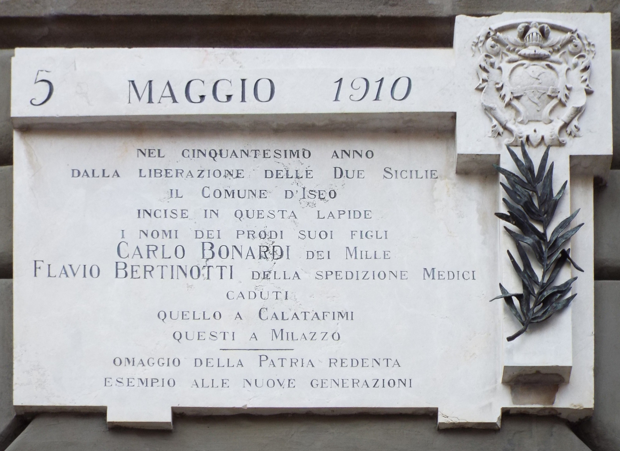 Lapide dedicata alla memoria dei combattenti Carlo Bonardi e Flavio Bertinotti, volontari iseani de I Mille, morti rispettivamente a Calatafimi e a Milazzo.